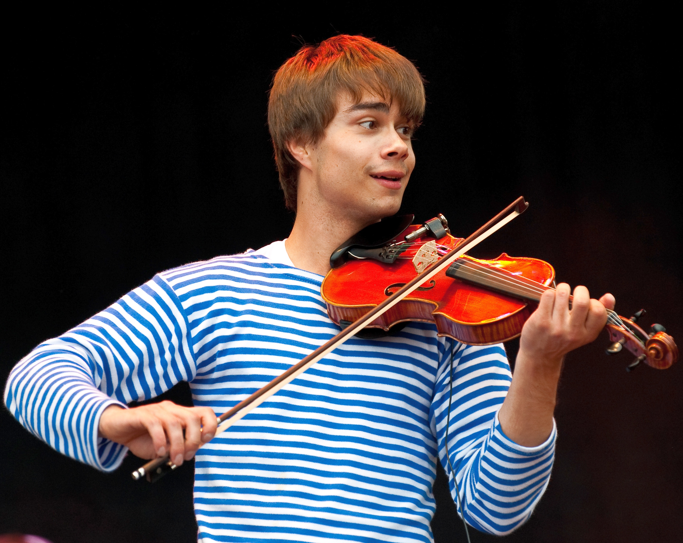 Alexander Rybak